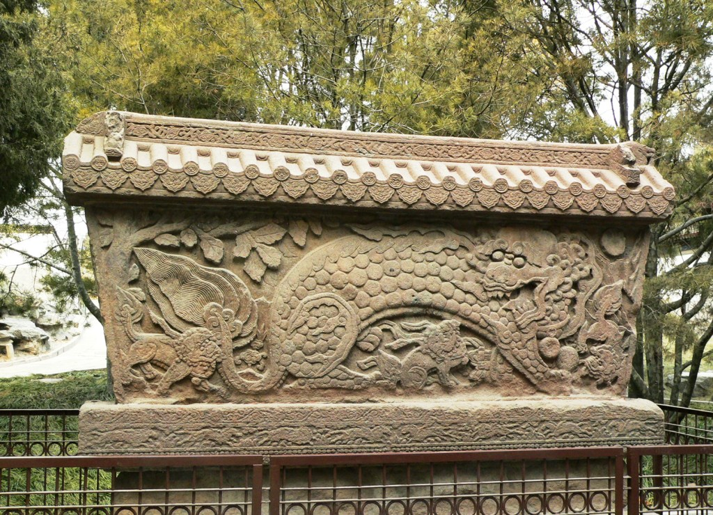 北海 铁影壁 2005年2月6日拍摄于北海北岸